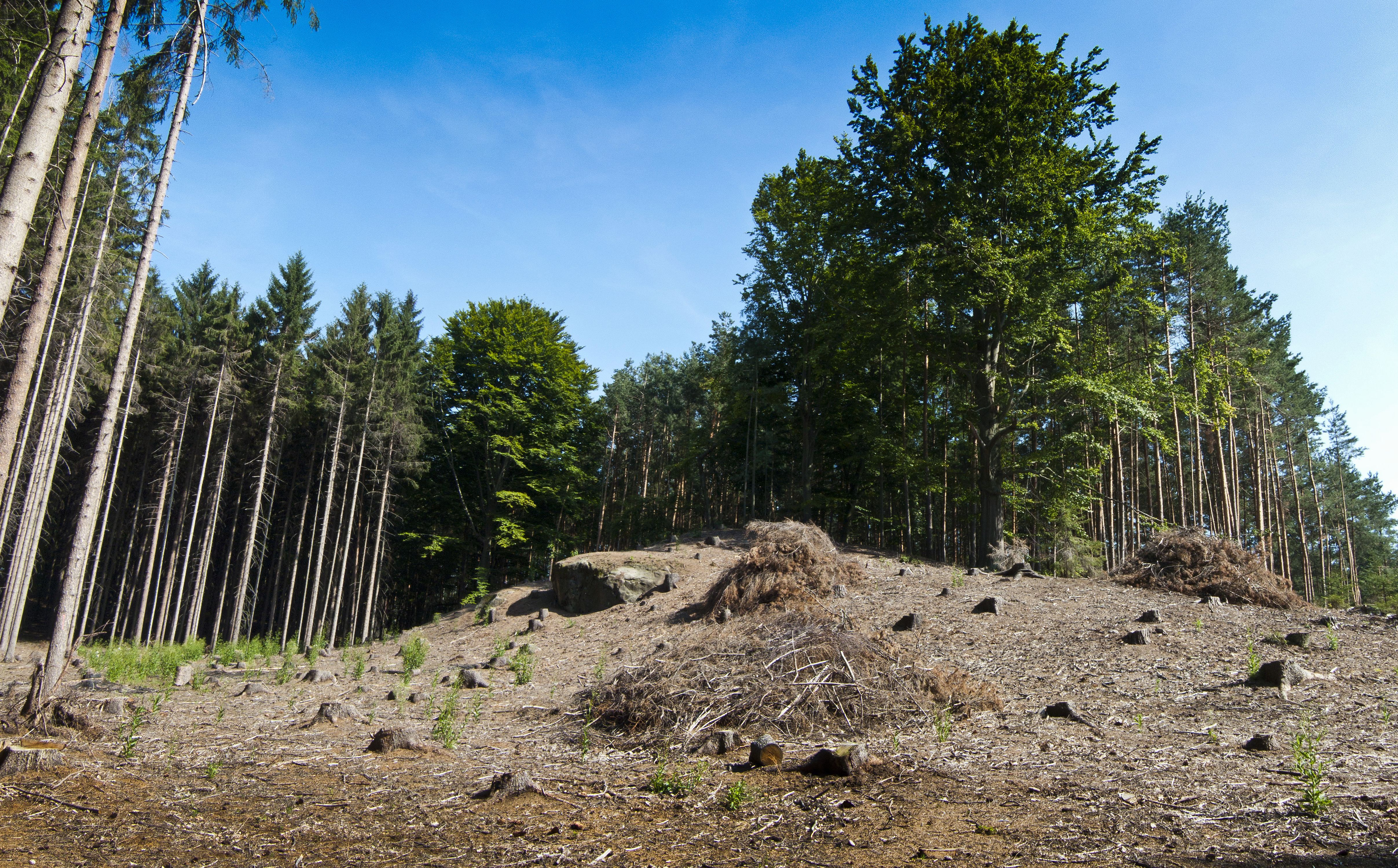 Přírodní park Čížovky